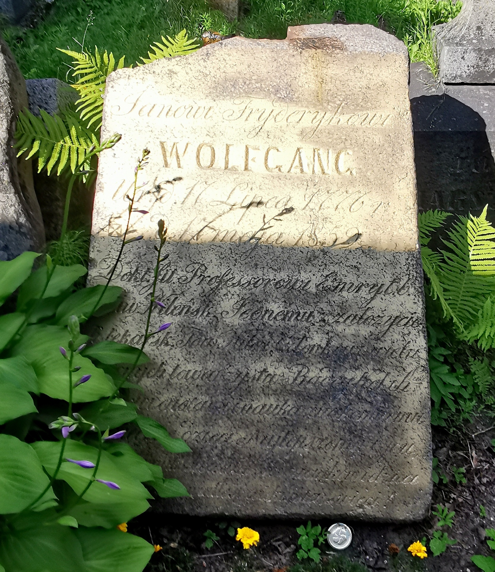 Johano Fridricho Volfgango antkapis. Johanas Fridrichas Volfgangas (vok. Johann Friedrich Wolfgang; 1776 m. liepos 17 d. – 1859 m. gegužės 17 d. Vilniuje) – vaistininkas, botanikas, Vilniaus universiteto profesorius.